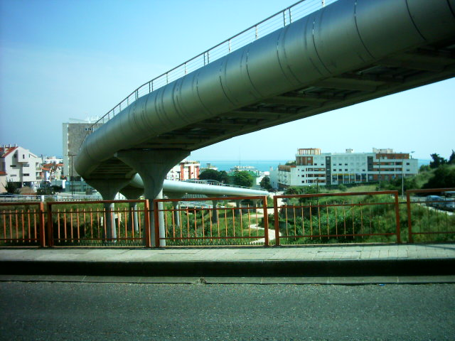 Viaduto do SATU visto da Tapada.